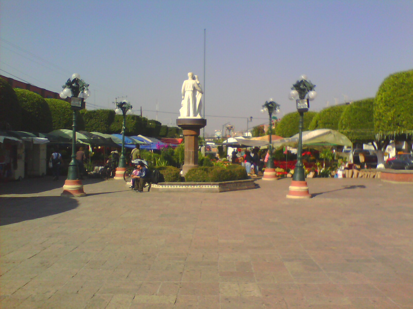 Pequeña plaza ubicada en la Avenida Juarez dedicada a la Familia